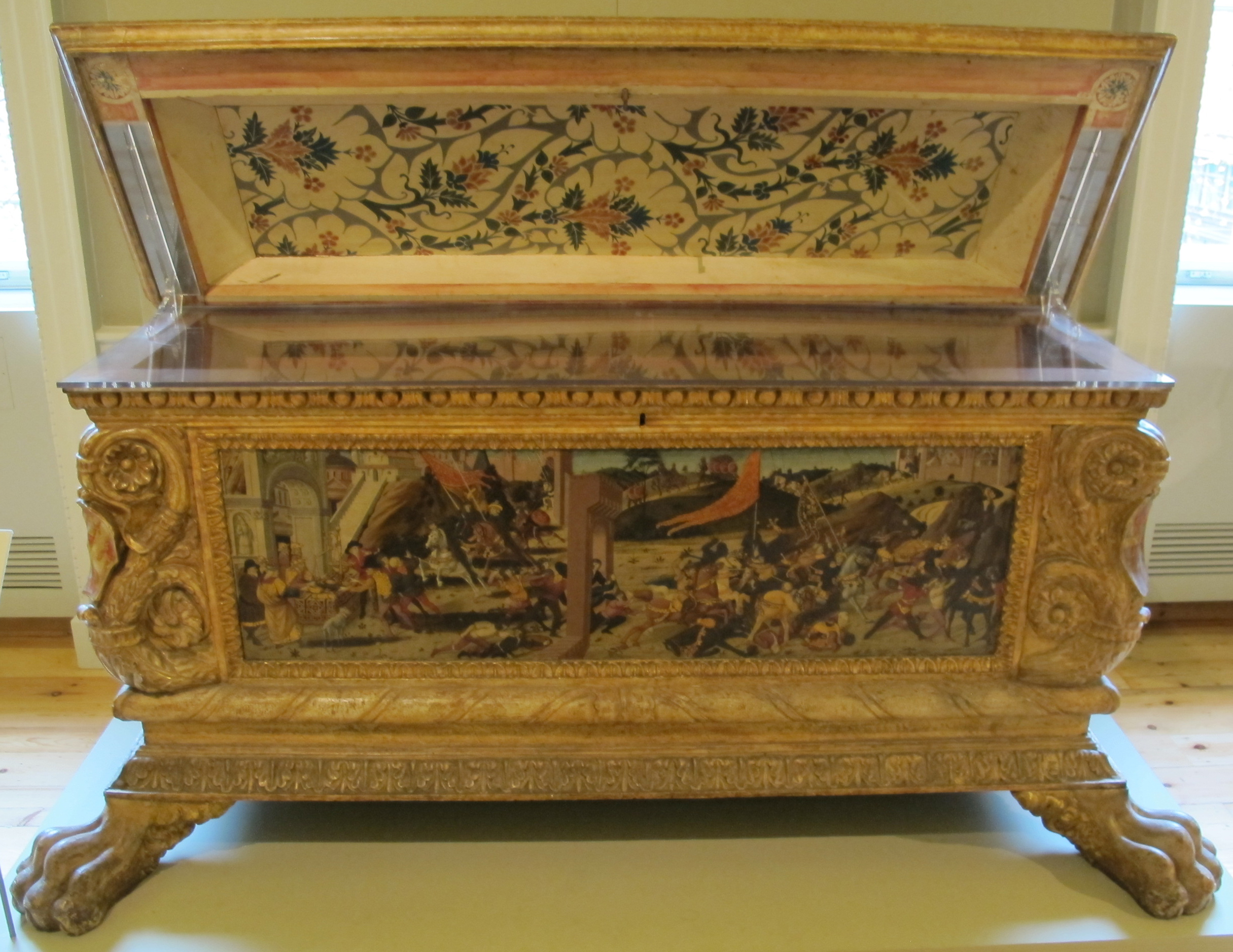 Zanobi di domenico, jacopo del sellaio e biagio d'antonio, cassone morelli, 1472